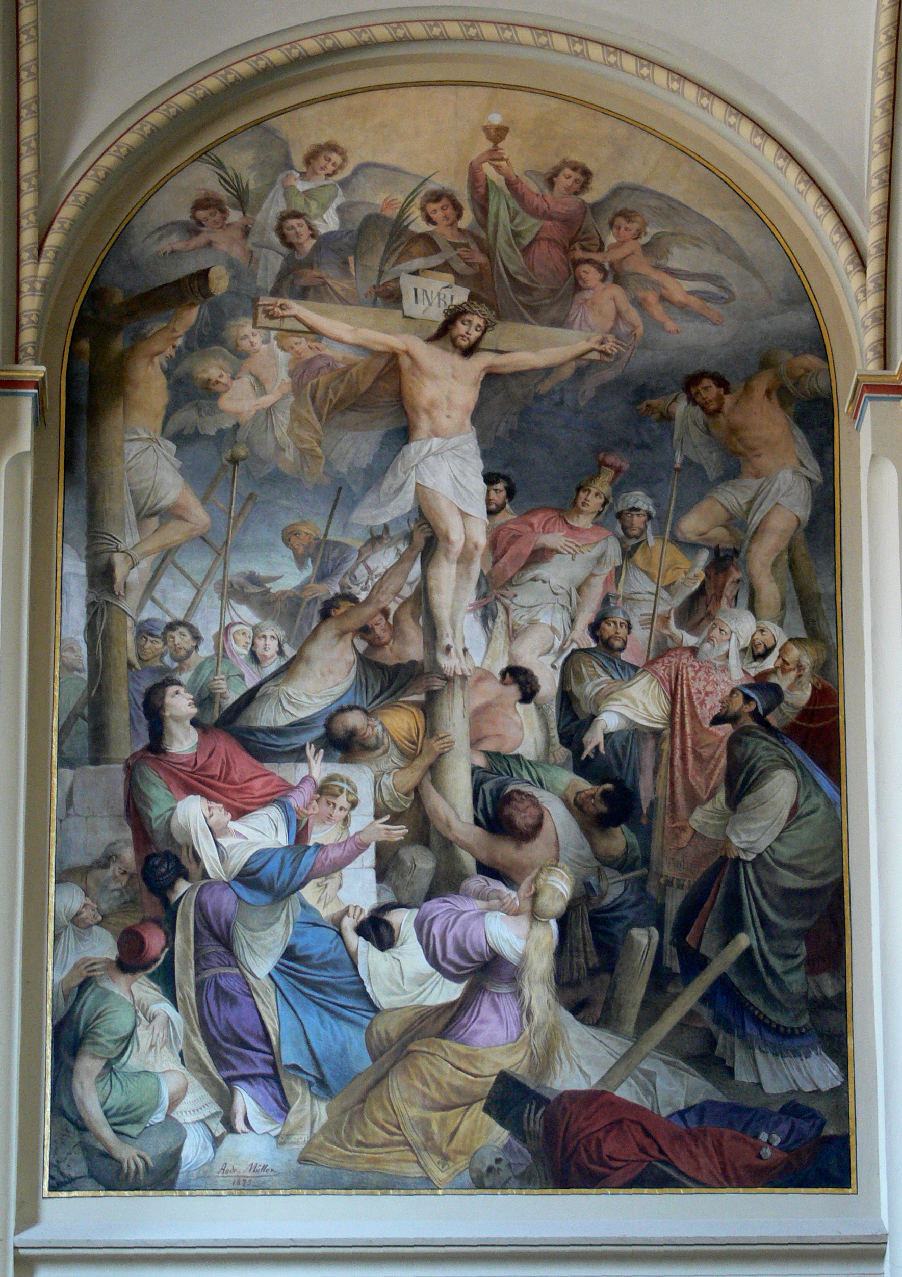 Weißenhorn (Landkreis Neu-Ulm), Stadtpfarrkirche Mariä Himmelfahrt Gemälde von Andreas Müller ("Komponiermüller")